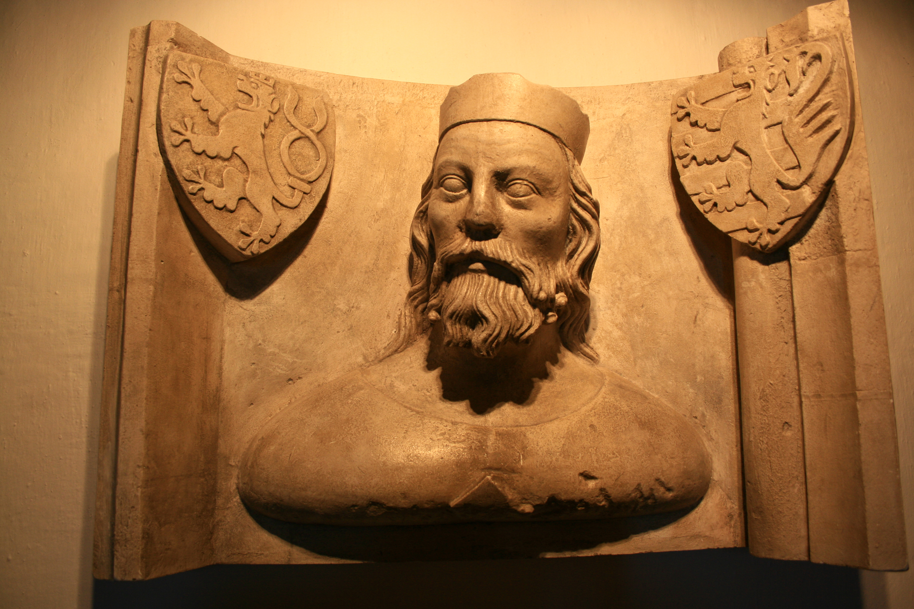 Hrad Kašperk, Žlíbek